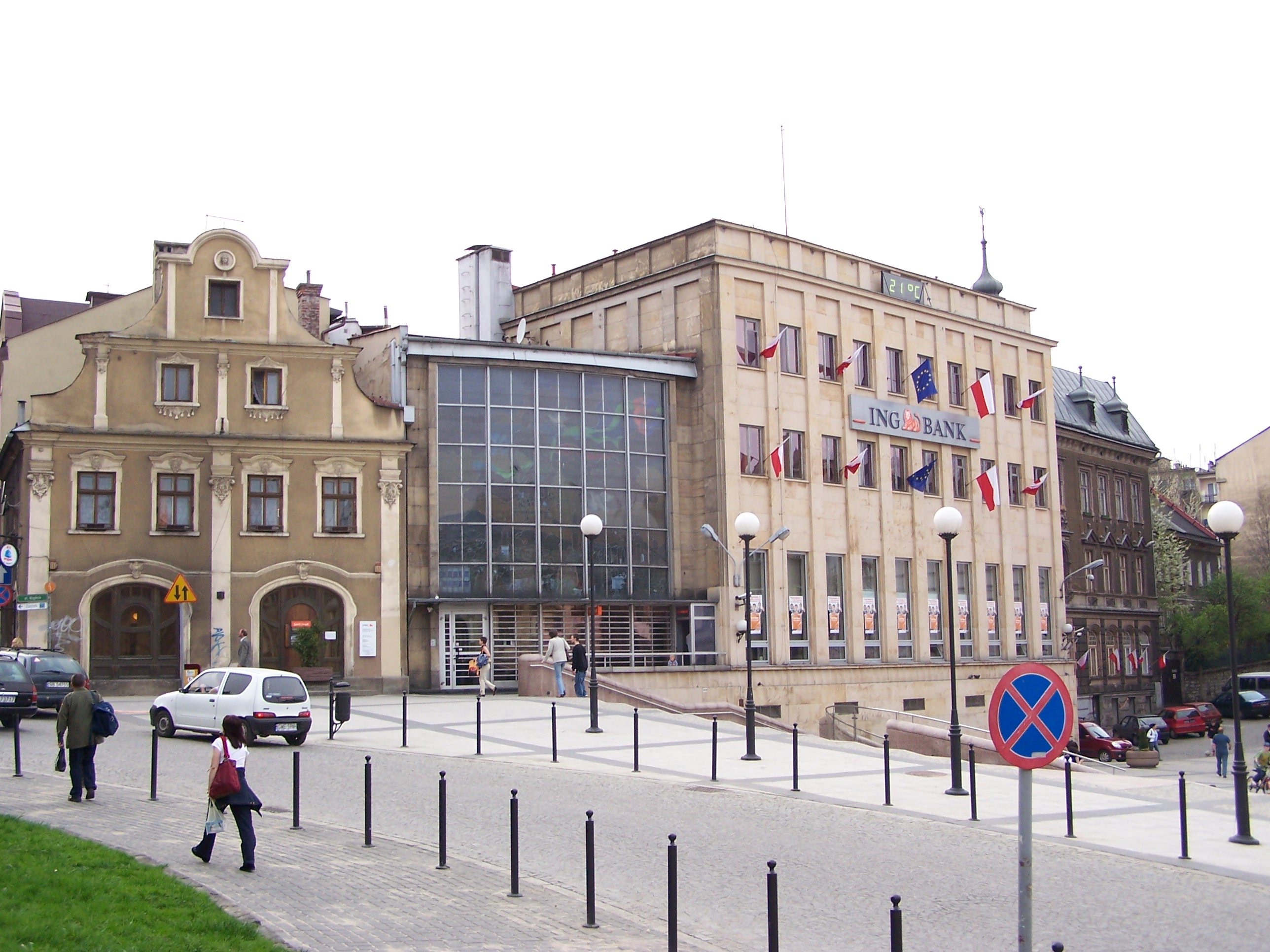 Centrum Bielska-Białej.